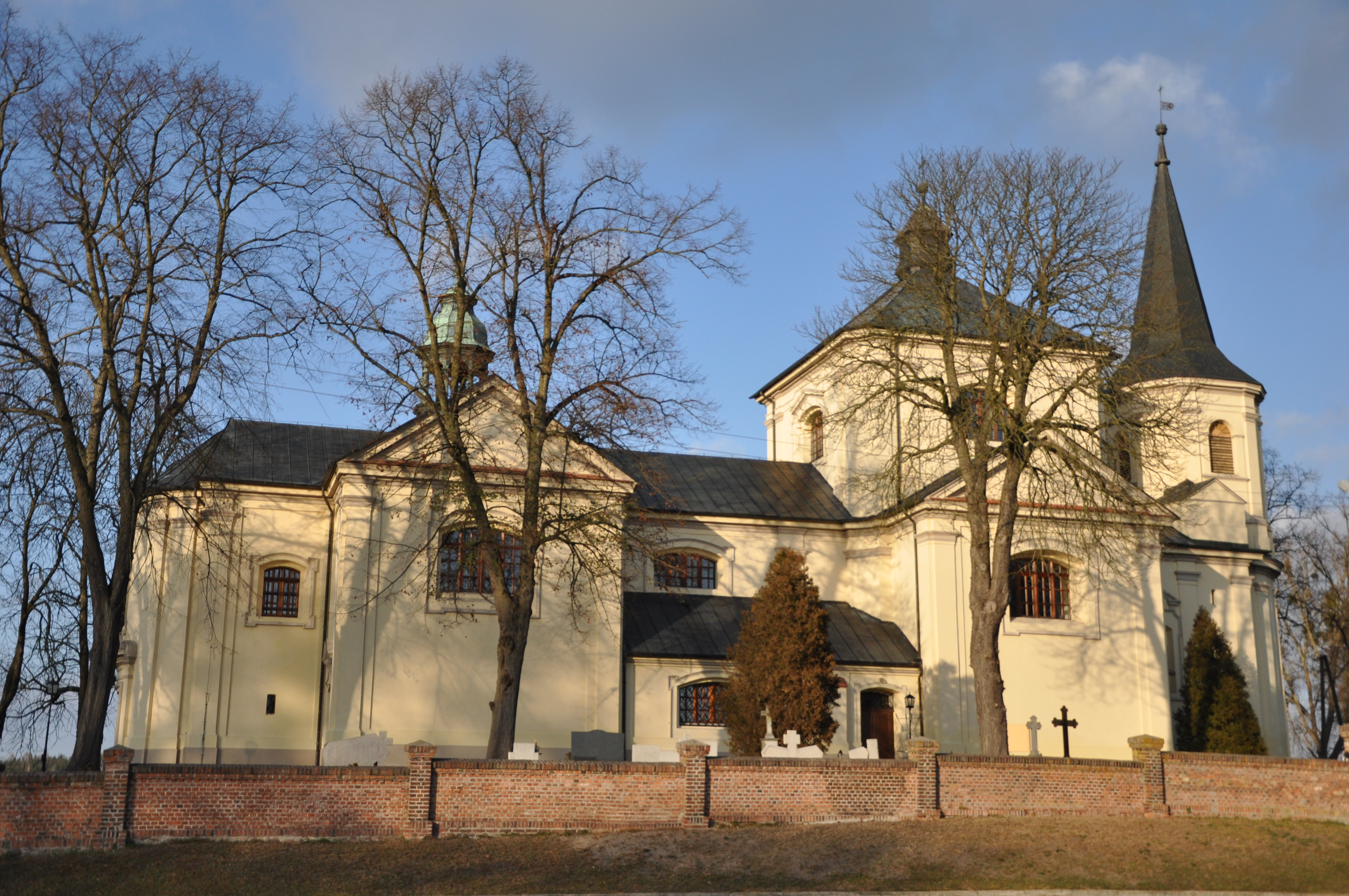 Kościół pod wezwaniem Św. Piotra i Pawła